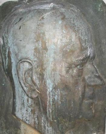 Relief mit Bildnis Kurt Schumachers am Kurt-Schumacher-Platz in Berlin-Reinickendorf